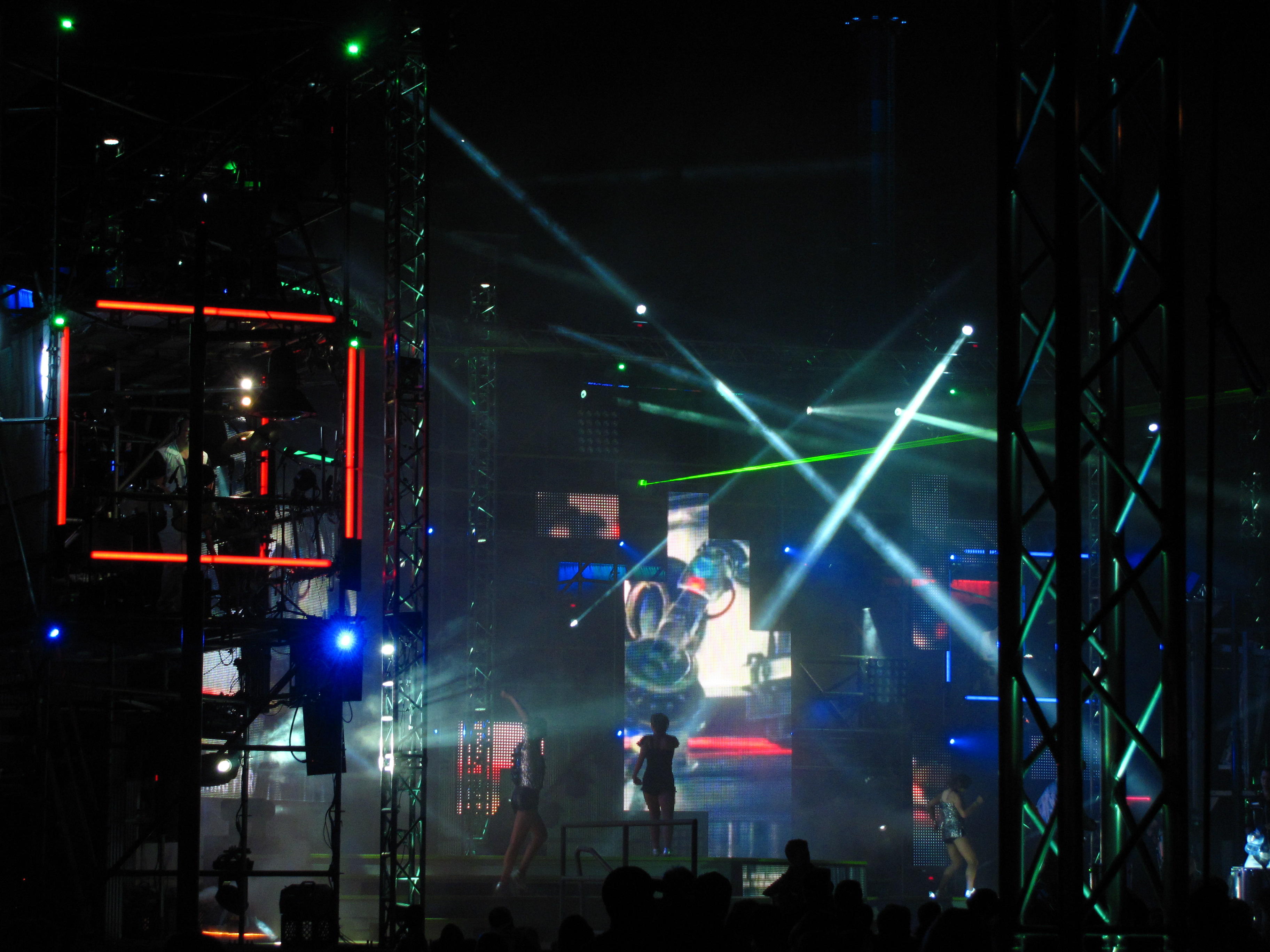 Cedar Point 098